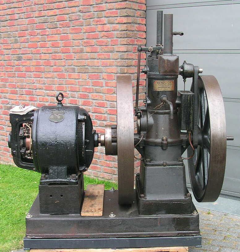 Kerkrade, Industrion, Motor von Benz-Mannheim beim Maschinenfest 2004